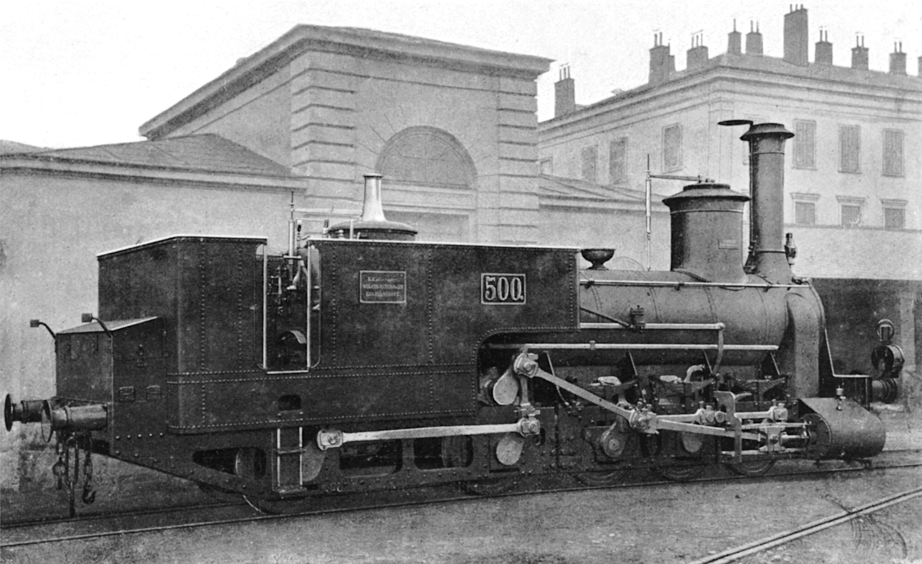 Lokomotive „Steyerdorff“, 1862 für die Banater Kohlenbahn der Österreichischen Staats-Eisenbahn-Gesellschaft . Bei der Maschine in der Bauart „Engerth-Fink“ handelt es sich um eine Stütztenderlokomotive System Engerth mit dem Antriebssystem Fink, bei dem die Tenderachsen über eine Blindwelle angekoppelt werden. Die Lokomotive wurde 1862 in London und 1867 in Paris ausgestellt.